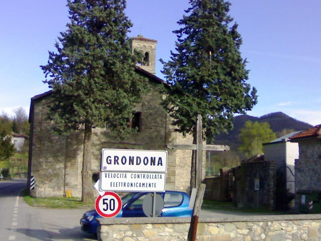 Chiesa romanica dell'Assunta a Grondona in valle Spinti